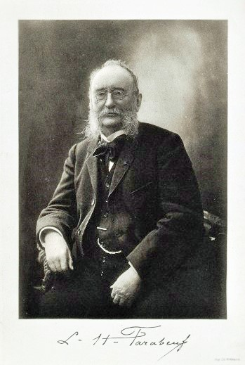 V0028130 Louis Hubert Farabeuf. Photogravure by Ch. Wittmann. Credit: Wellcome Library, London. Wellcome Images Louis Hubert Farabeuf. Photogravure by Ch. Wittmann. Published: - Copyrighted work available under Creative Commons Attribution only licence CC BY 4.0